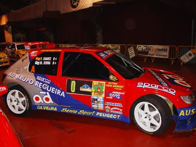 Rally Botafumeiro 2006. Parque cerrado en el Recinto Feiral de Amio.